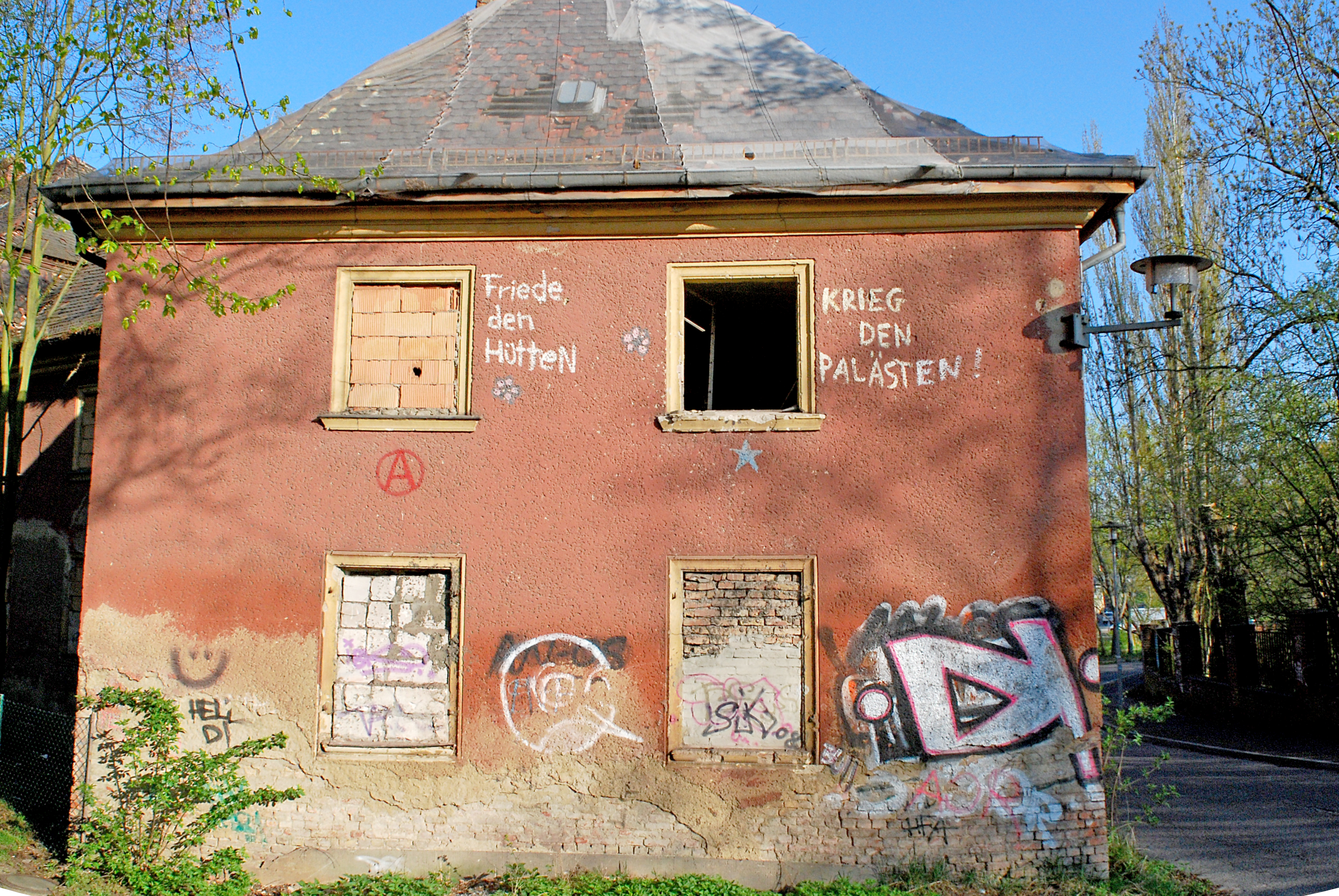 Kießlinghaus Frankfurt (Oder), Wohnhausgruppe Leipziger Straße 196, 197, 198 Frankfurt (Oder)